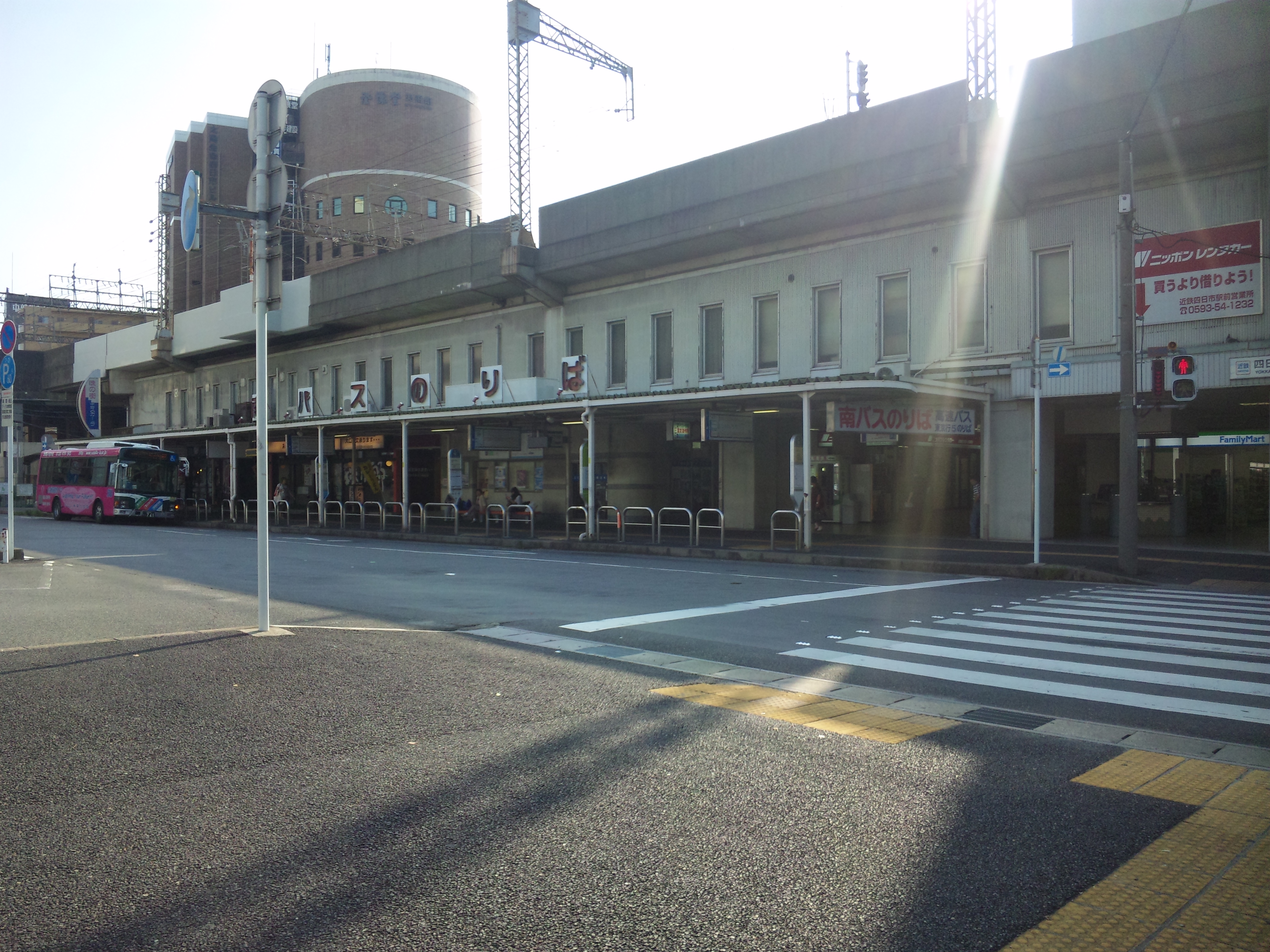 近鉄四日市駅南バスのりば